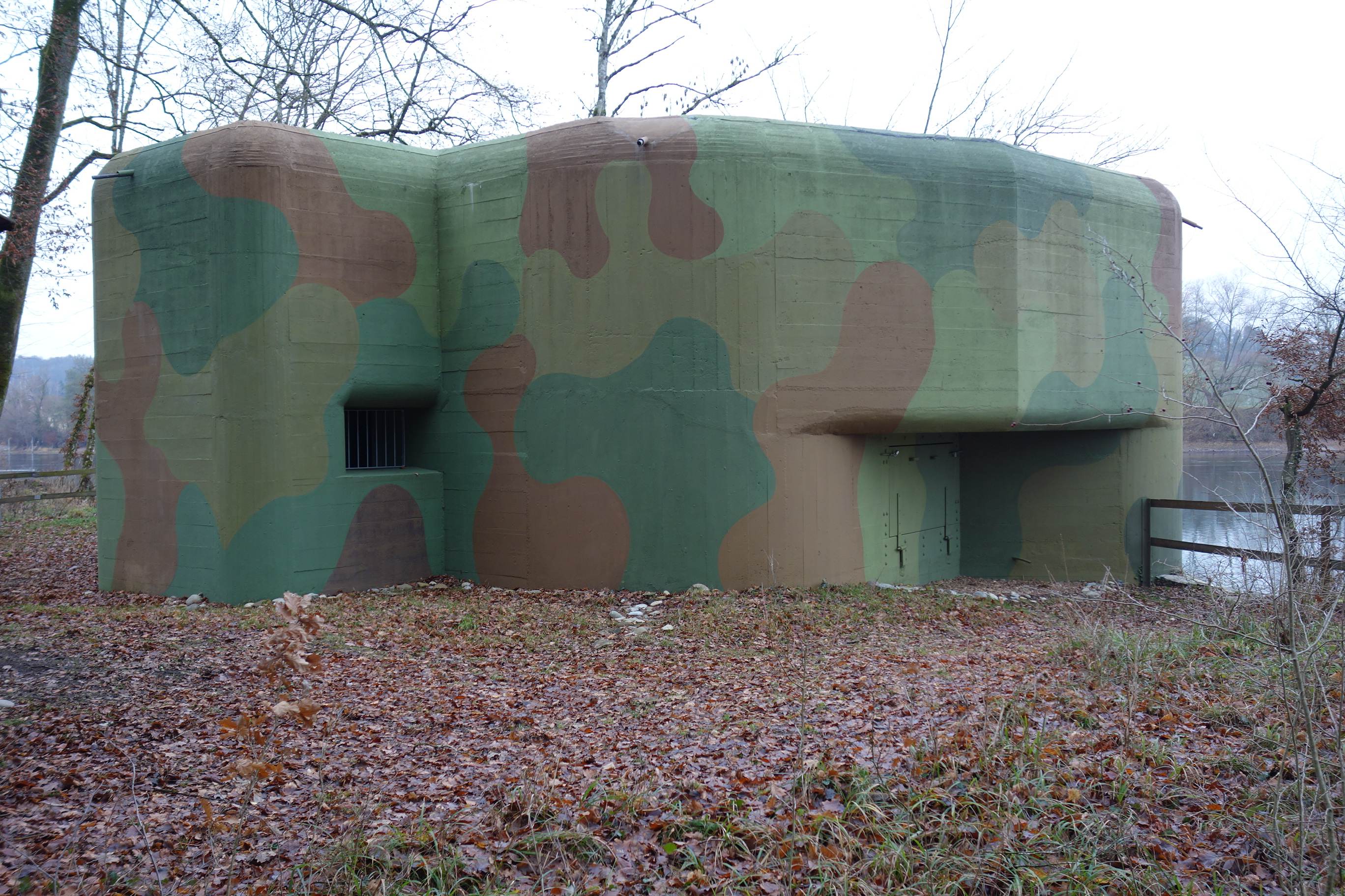 Sperrstelle Schaarenwald, Schlatt TG